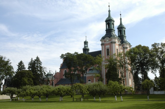 Gościkowo, kościół p.w. Wniebowzięcia NMP, w zespole klasztornym cystersów, mur., XIII, XVIII